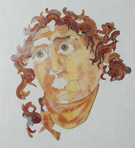 Testa di Helios-Sol, opus sectile, dal Mitreo di Santa Prisca, Aventino, Roma. Museo Nazionale Romano